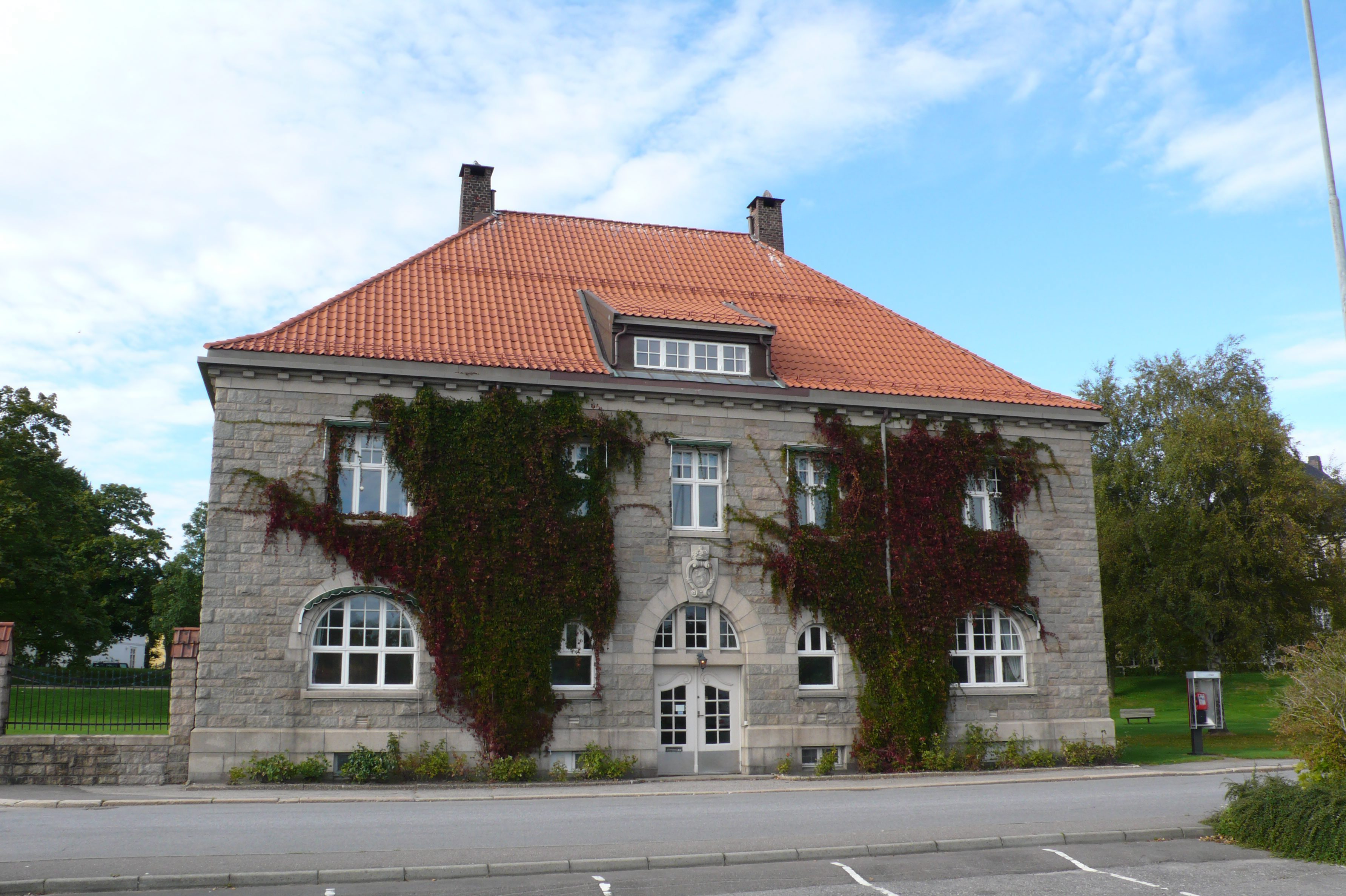 Fredrikstad tollbod. Foto: Lene Buskoven, fra Riksantikvarens Kulturminnebilder.